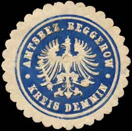 Sealing stamp Title: Amtsbezirk Beggerow Kreis Demmin Description: blau, weiß, geprägt Place: Beggerow size: 3 cm